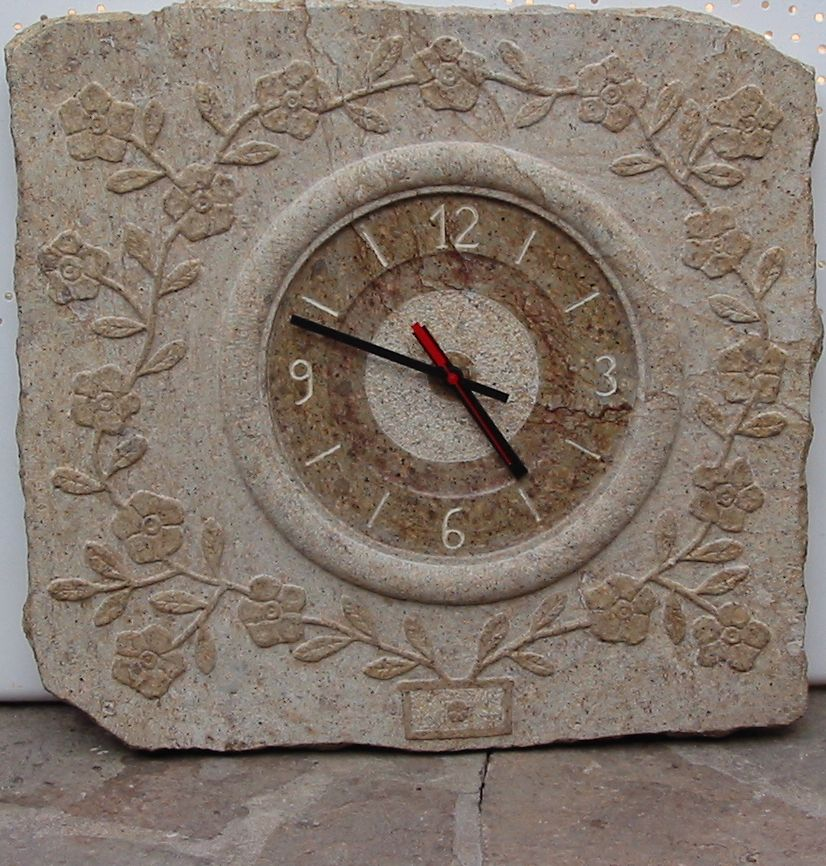 bassorilievo fatto a mano su trachite con orologio